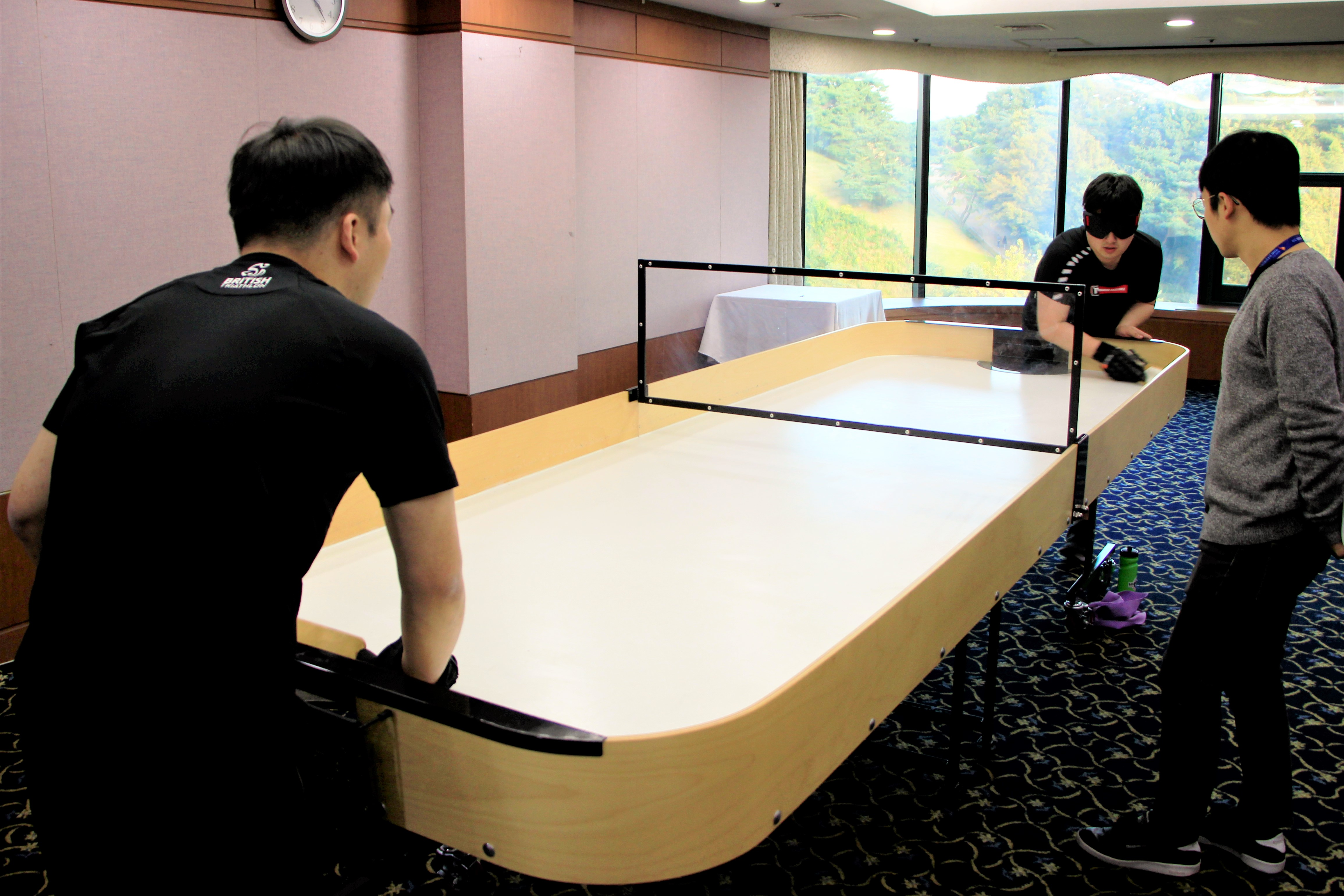 쇼다운 종목 연습경기가 열리는 2019 전국체육대회 현장의 모습.